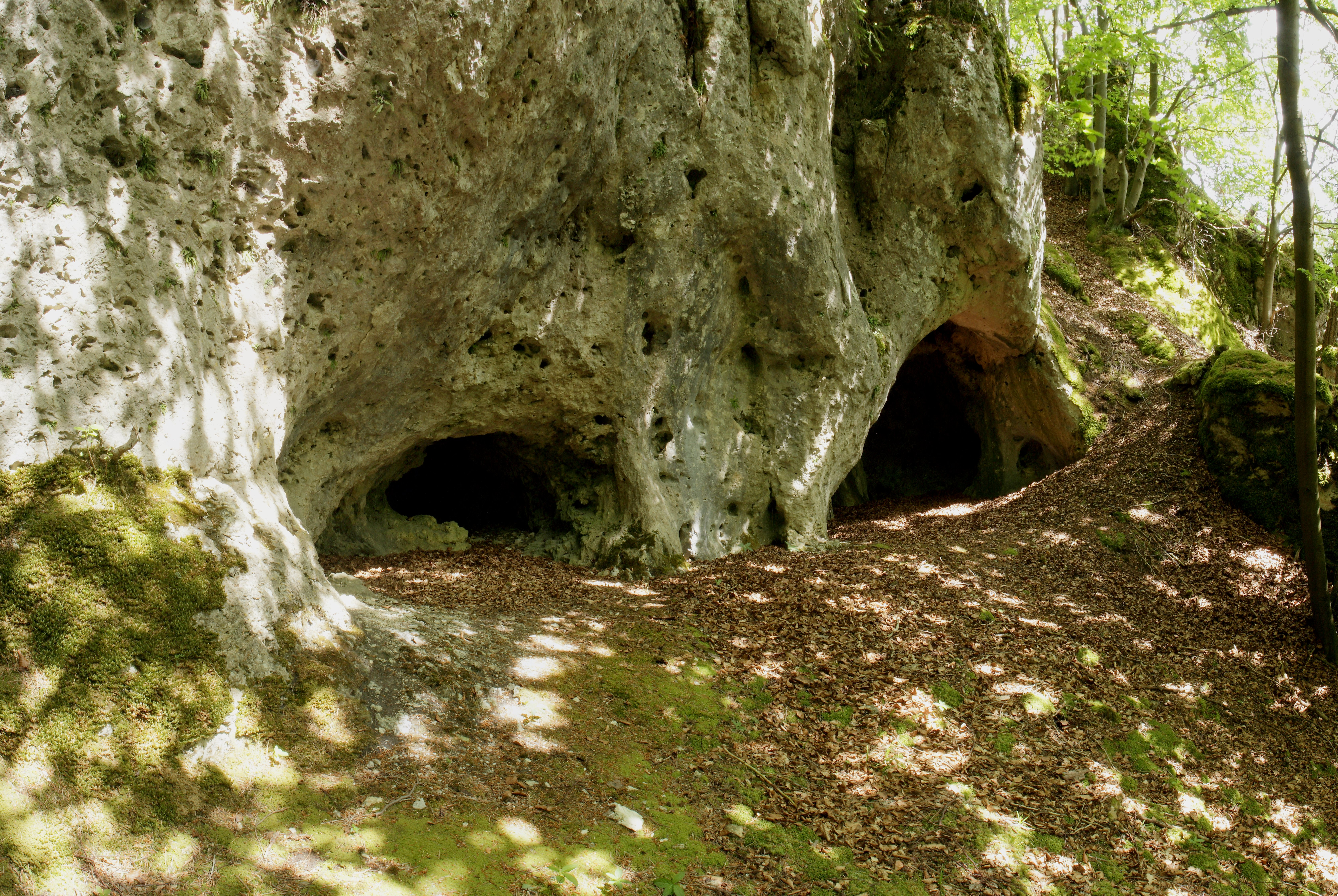 Burgstall im Eibental - Kleine Höhlen im Burgfels